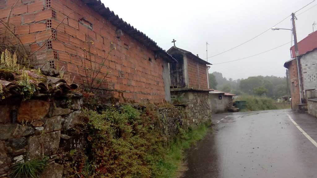 Vista do Castro, Curtis.